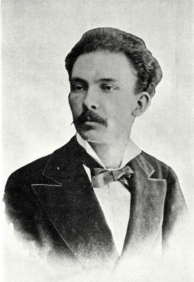 Foto de Valleto y Cía., México, D.F. Figuró en la iconografía que publicó el Diario de la Marina el 29 de enero de 1922, como homenaje al 69 aniversario de su natalicio. En 1875, Martí estuvo en Guatemala y cortejó a la dama María Garcia Granados y Saborío, quien murió poco después. Martí la inmortalizó en el poema La Niña de Guatemala.